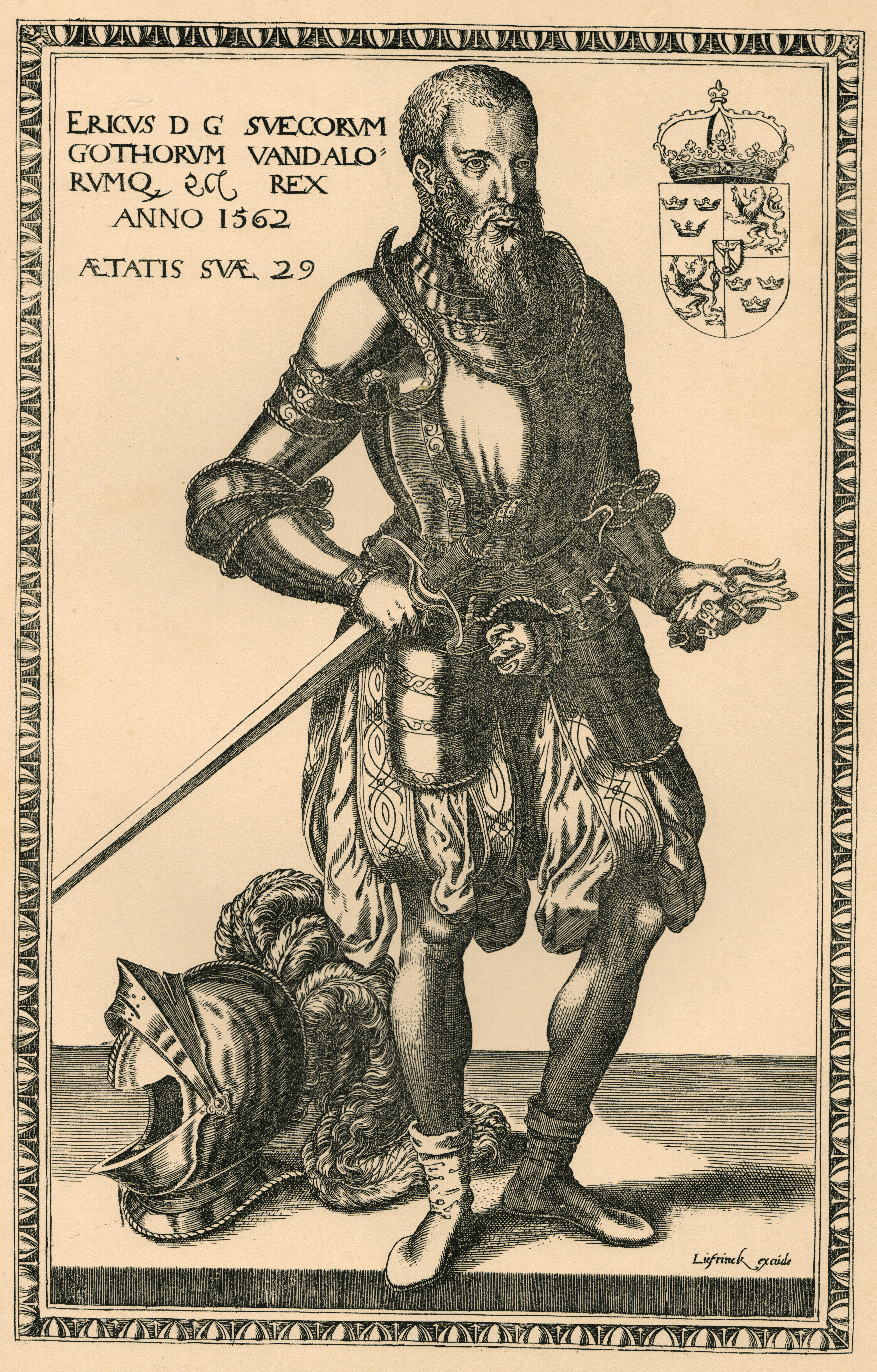 Erik XIV. Ett mycket sällsynt kopparstick, som likaledes afbildats i Upmarks arbete: Svenska porträtt etc. Den gravör, som signerat detta senare stick, är Hans Liefrinck, verksam i Antwerpen 1540 — 1580, känd som målare, kopparstickare, formsnidare och förläggare; Upmark antager likväl, att dennes namn endast skyltar såsom förläggarefirma för bilden, hvilken sannolikt är graverad af Frans Huys, som arbetade mellan 1550 och 1570 och på beställning just af Liefrinck utfört ett flertal bilder, framställande kända personer från denna tid. Hvem som förskaffat Cock och sannolikt äfven Huys deras förebild är däremot svårare att gissa. Erik hade flera målare i sin tjenst t. ex. den med anledning af Gustaf I:s porträtt omnämnde Dominicus ver Wilt, Johan Baptista van Uther, eller Willem Boy, som måhända får anses såsom den sannskyldige upphofsmannen, ehuru detta likväl endast med reservation.